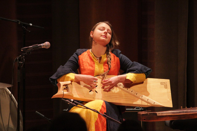 Laima Jansone koncertā Stokholmā 2015. gada 5. februārī.